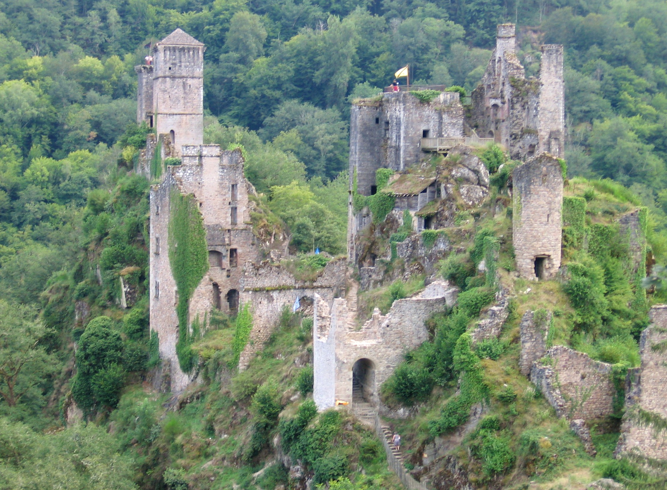 Ruine du château avec ces tours impressionantes